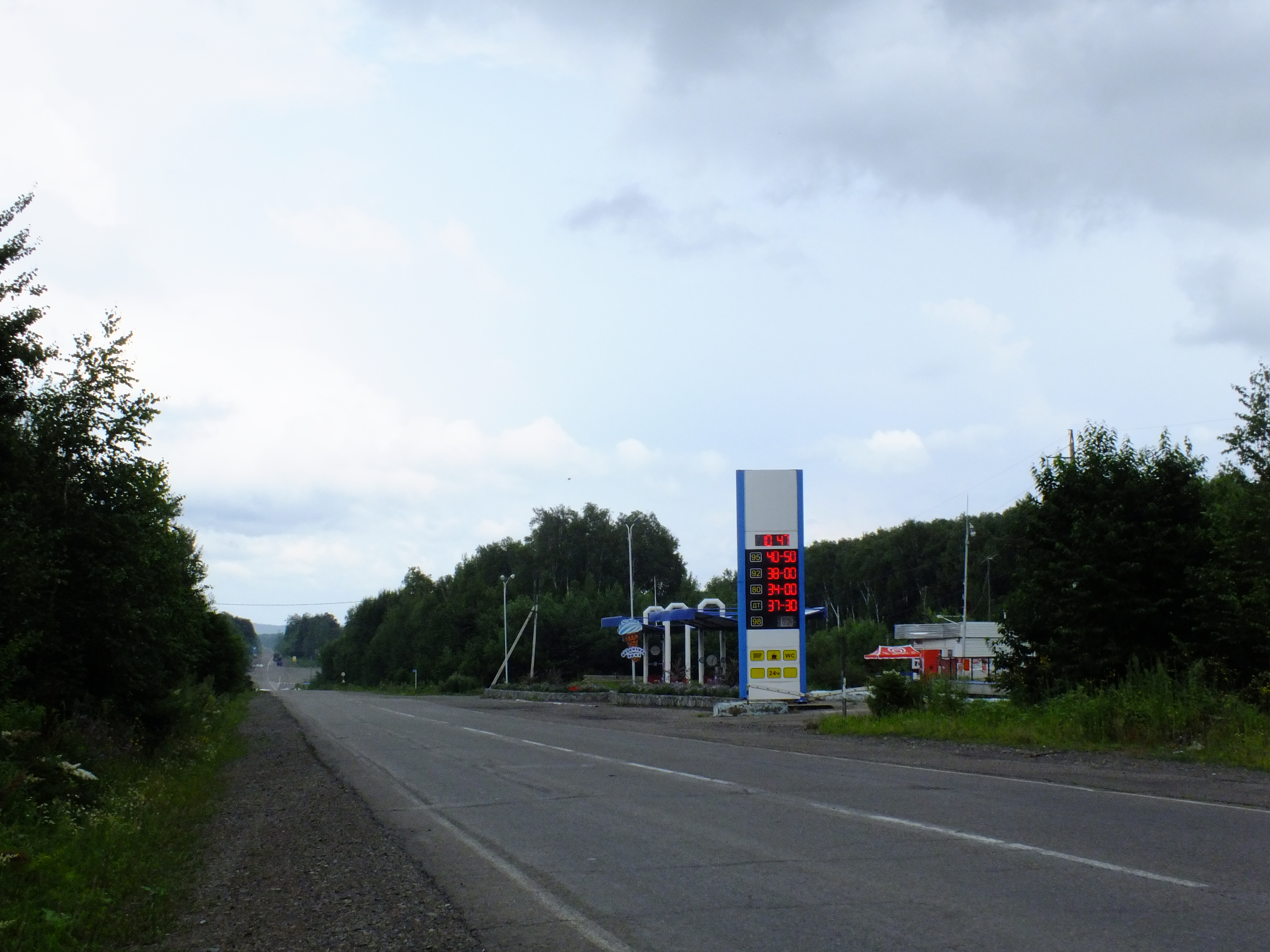 Село Лидога Нанайский район Хабаровский край